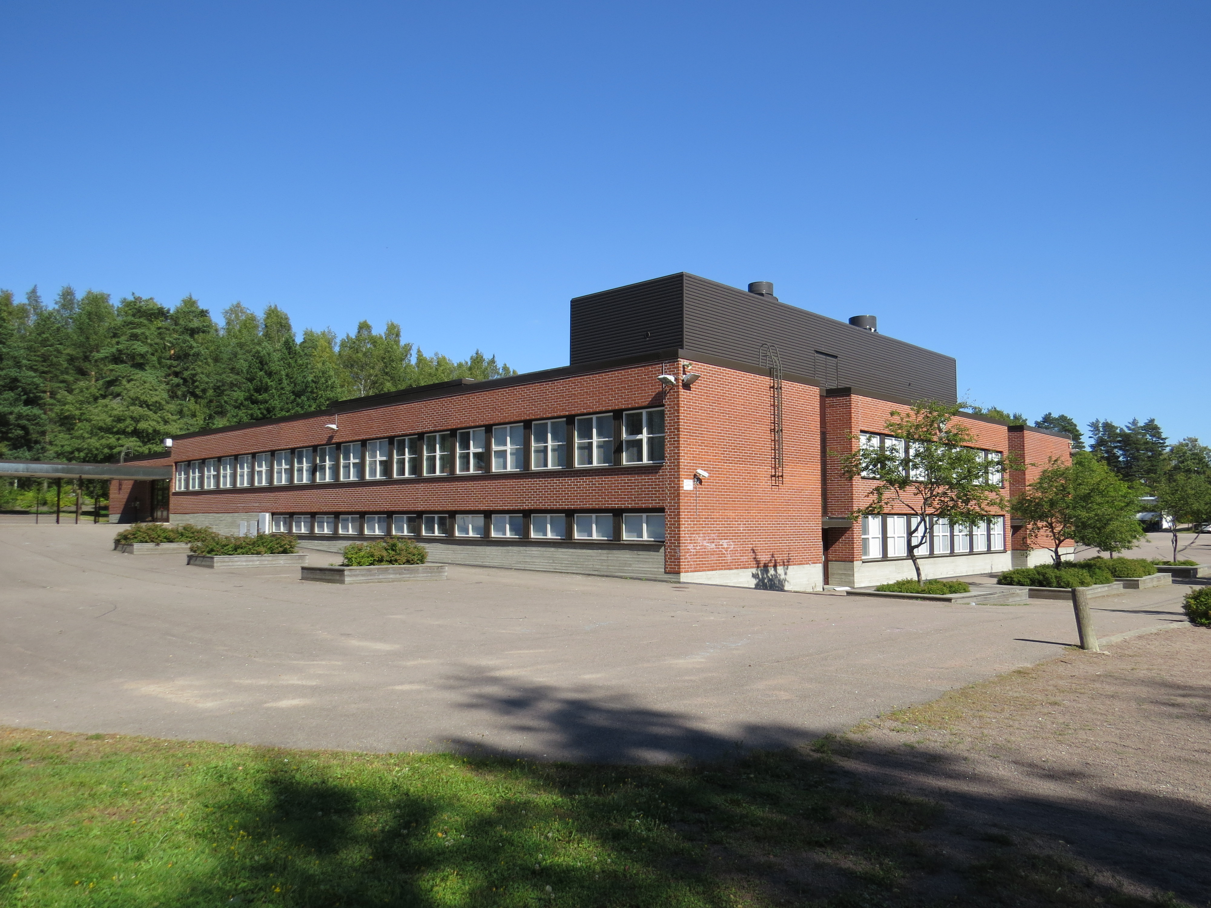 Ruonalan peruskoulu Kotkassa Ruonalan kaupunginosassa.